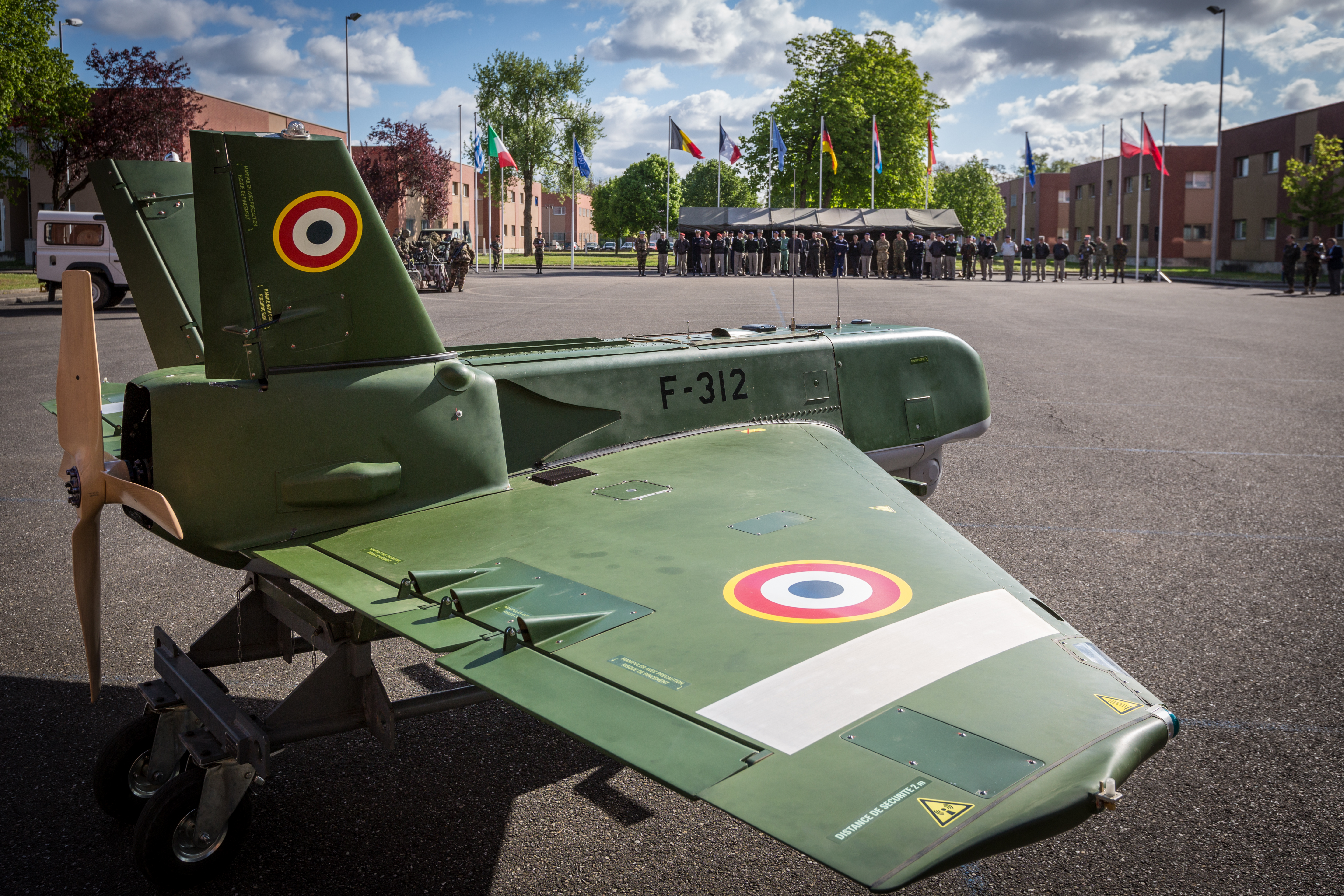 BRIGADEX 2014 Eurocorps Quartier Aubert de Vincelles Strasbourg 15 avril 2014.